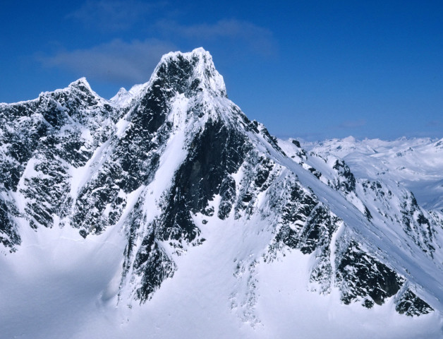 Store Skagastølstind sett fra Dyrehaugsryggen i mai